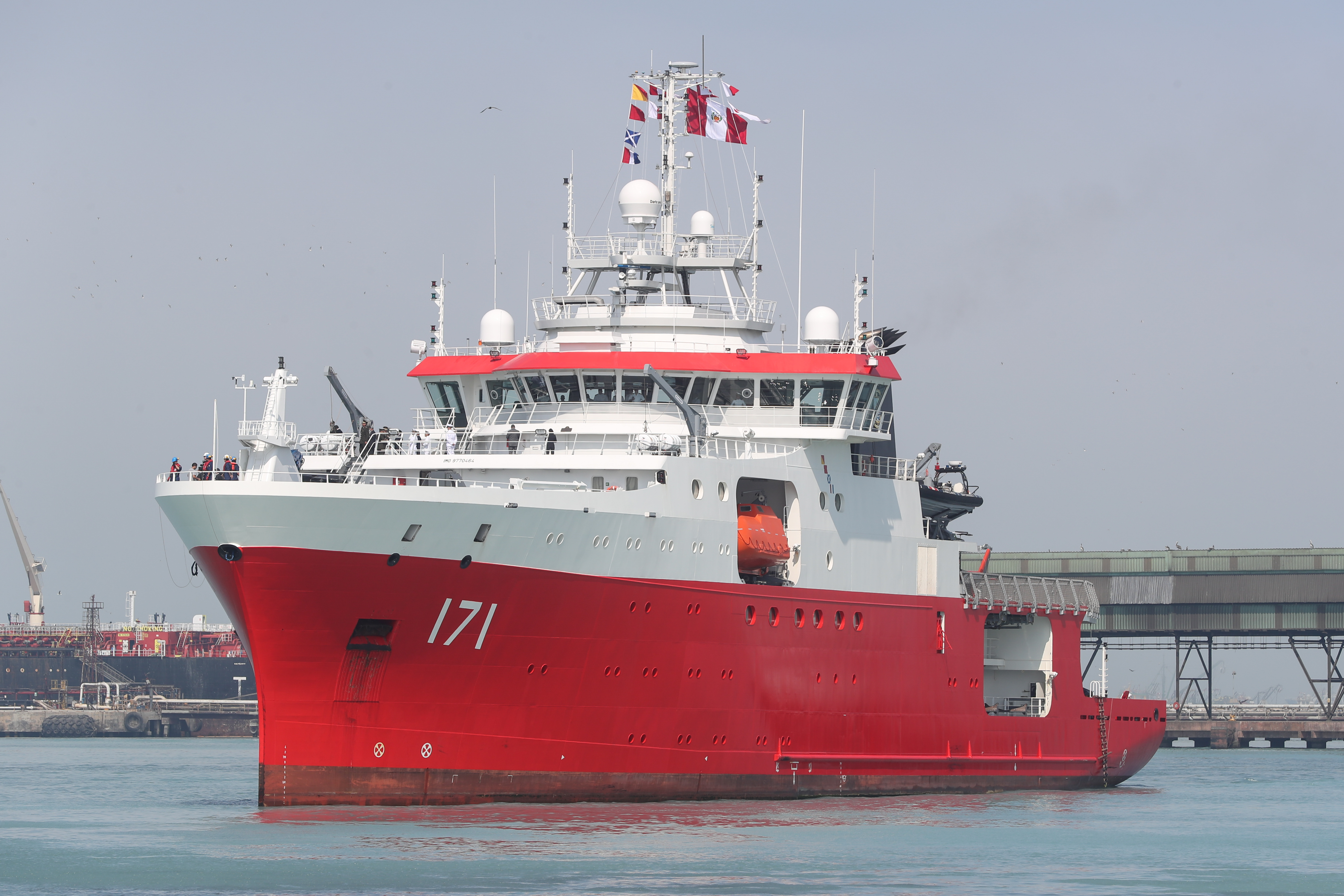 Retorno del BAP CARRASCO de su misión a la base antártica peruana Machu Pucchu.